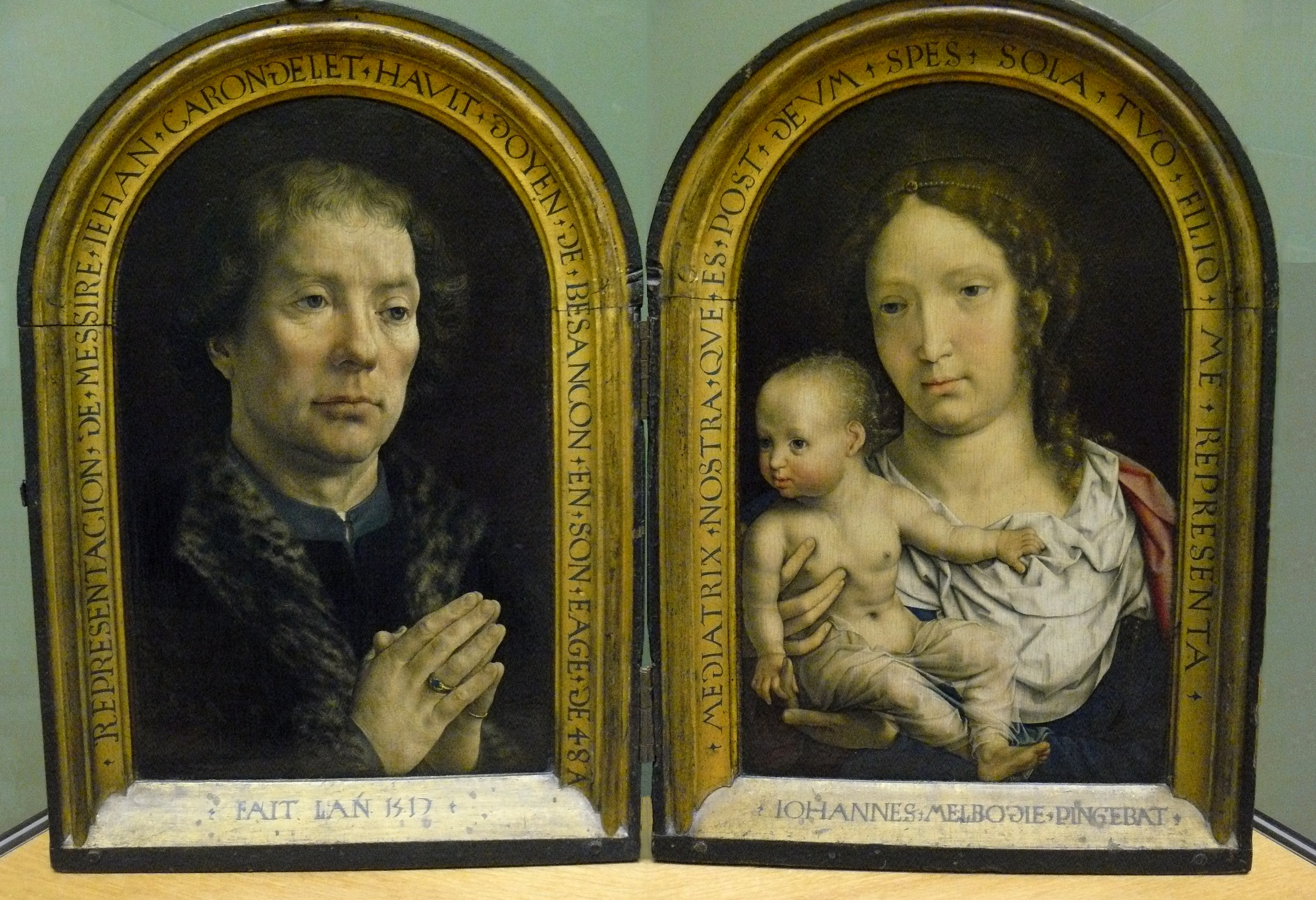 Ditptyque peint par Jan Gossaert, daté 1517 - Gauche : portrait de Jean Carondelet, (1469-1544) - titulature sur l'entourage : 48 ans, doyen de la cathédrale de Besançon. revers : blason, chiffre 'IC' et devise Matura - Droit : Vierge à l'Enfant, revers : vanité, chiffre 'IC' et citation de Saint Jérôme. - Musée du Louvre, hauteur environ 40 cm - Inv. n° 1442-1443